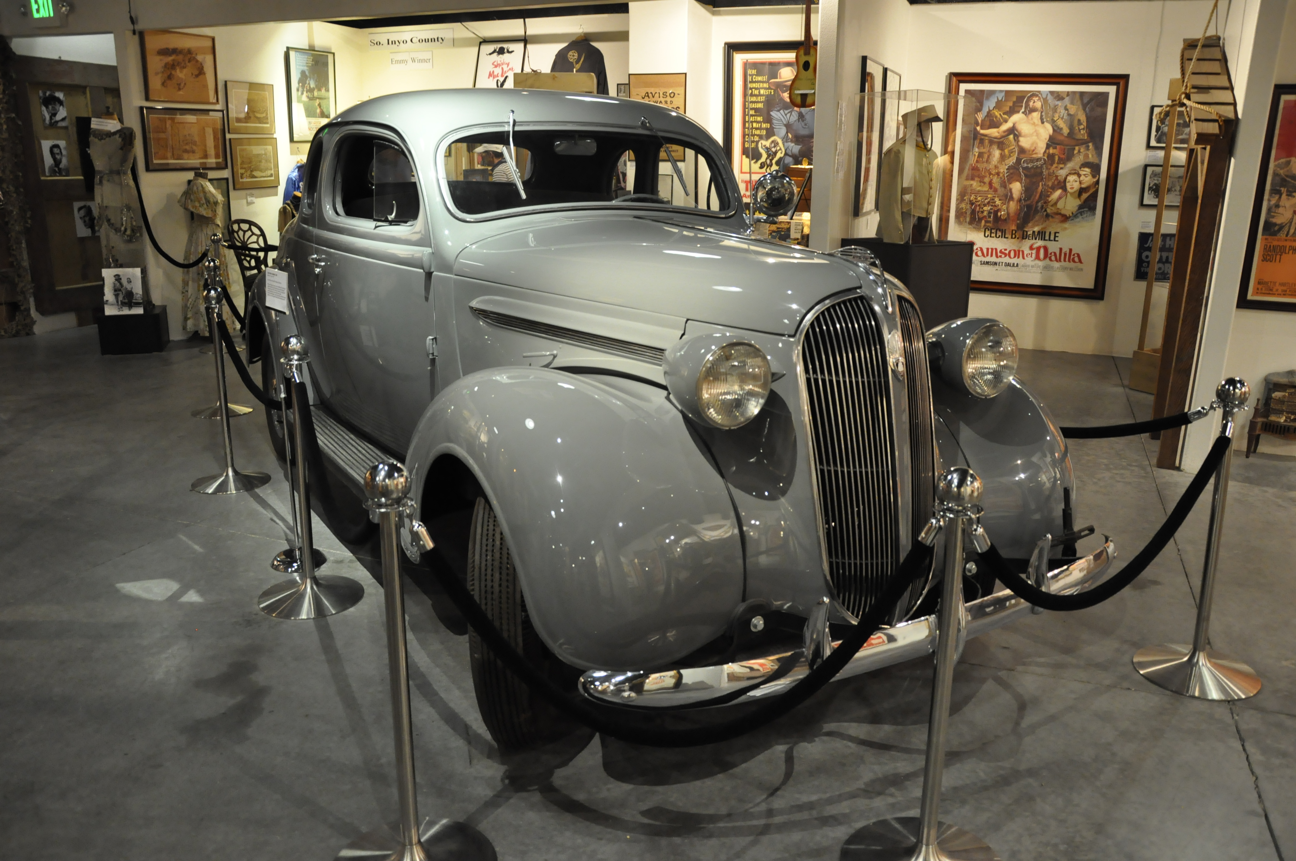 Plymouth Coupe 1937 gebruikt door Humphrey Bogart in de film High Sierra, in het Lone Pine Film History Museum te Lone Pine, CA, USA